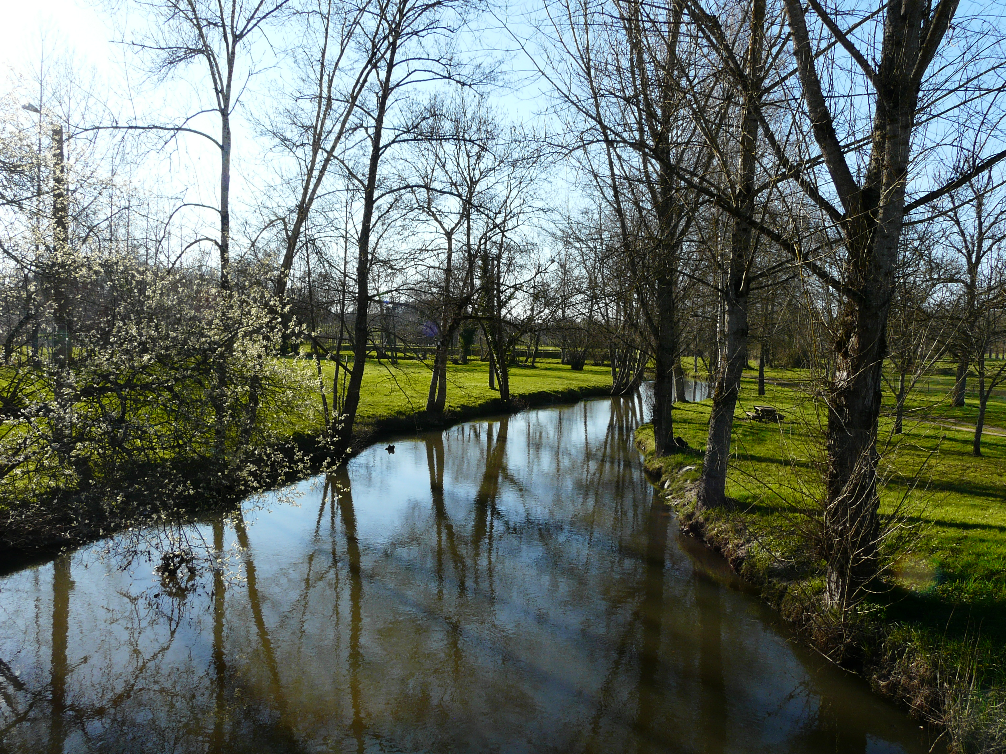 La Rizonne en aval du pont du Moulin de Rafaly, Saint-Vincent-Jalmoutiers, Dordogne, France.